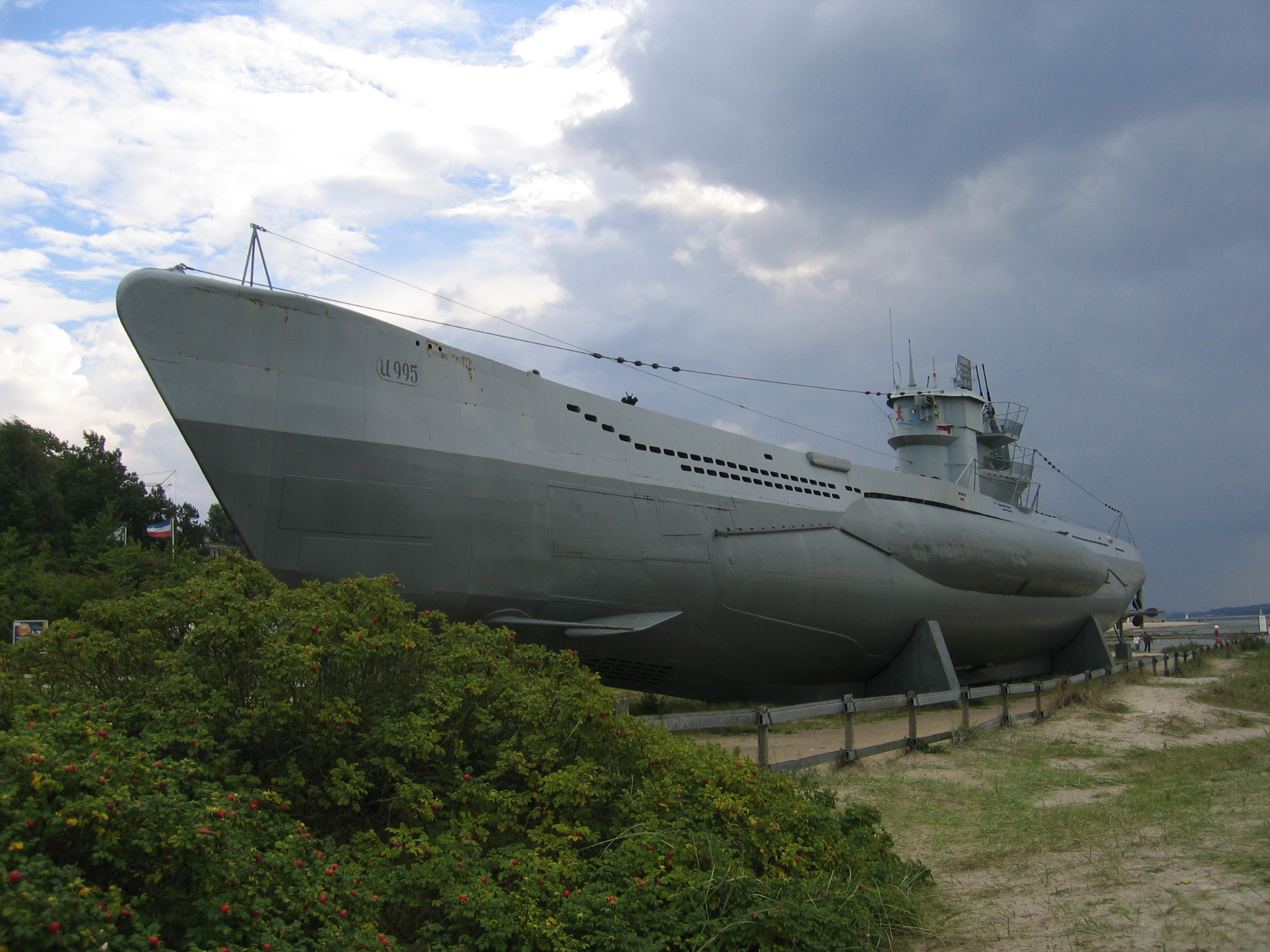 U-Boot U995 am Strand von Laboe